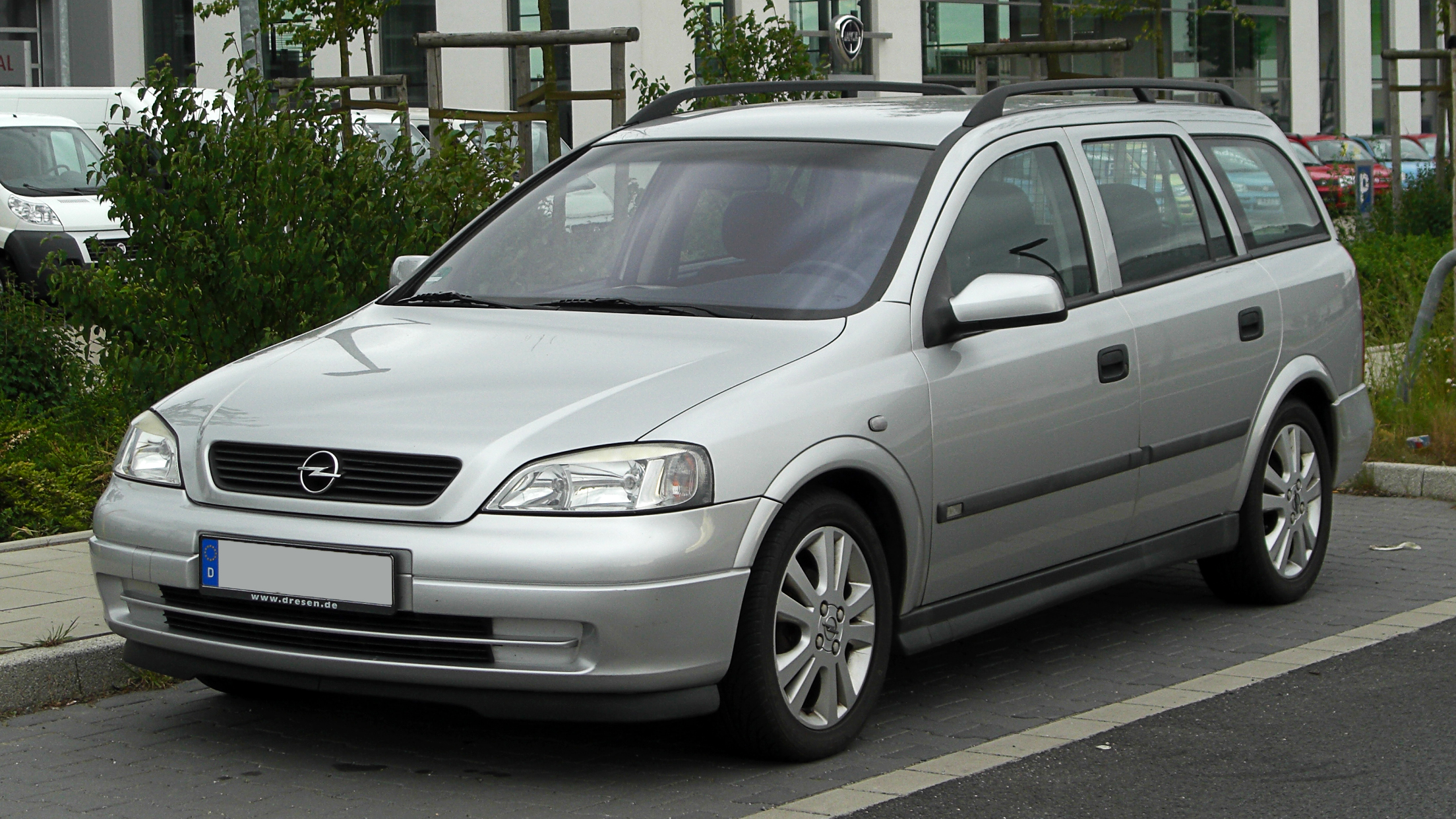 Opel Astra Caravan 1.6 16V Selection (G)